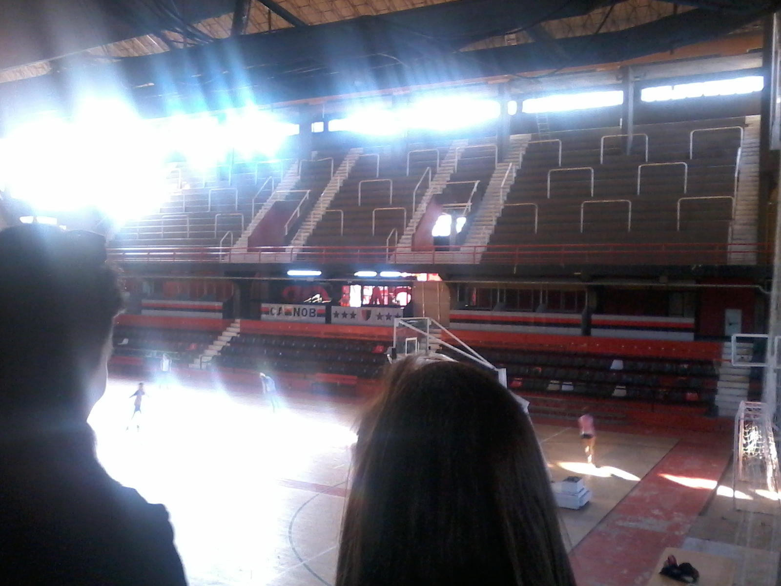 Estadio Cubierto "Dr. Claudio. L. Newell"